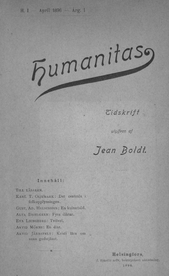 Humanitas-lehden ensimmäisen numeron etusivu